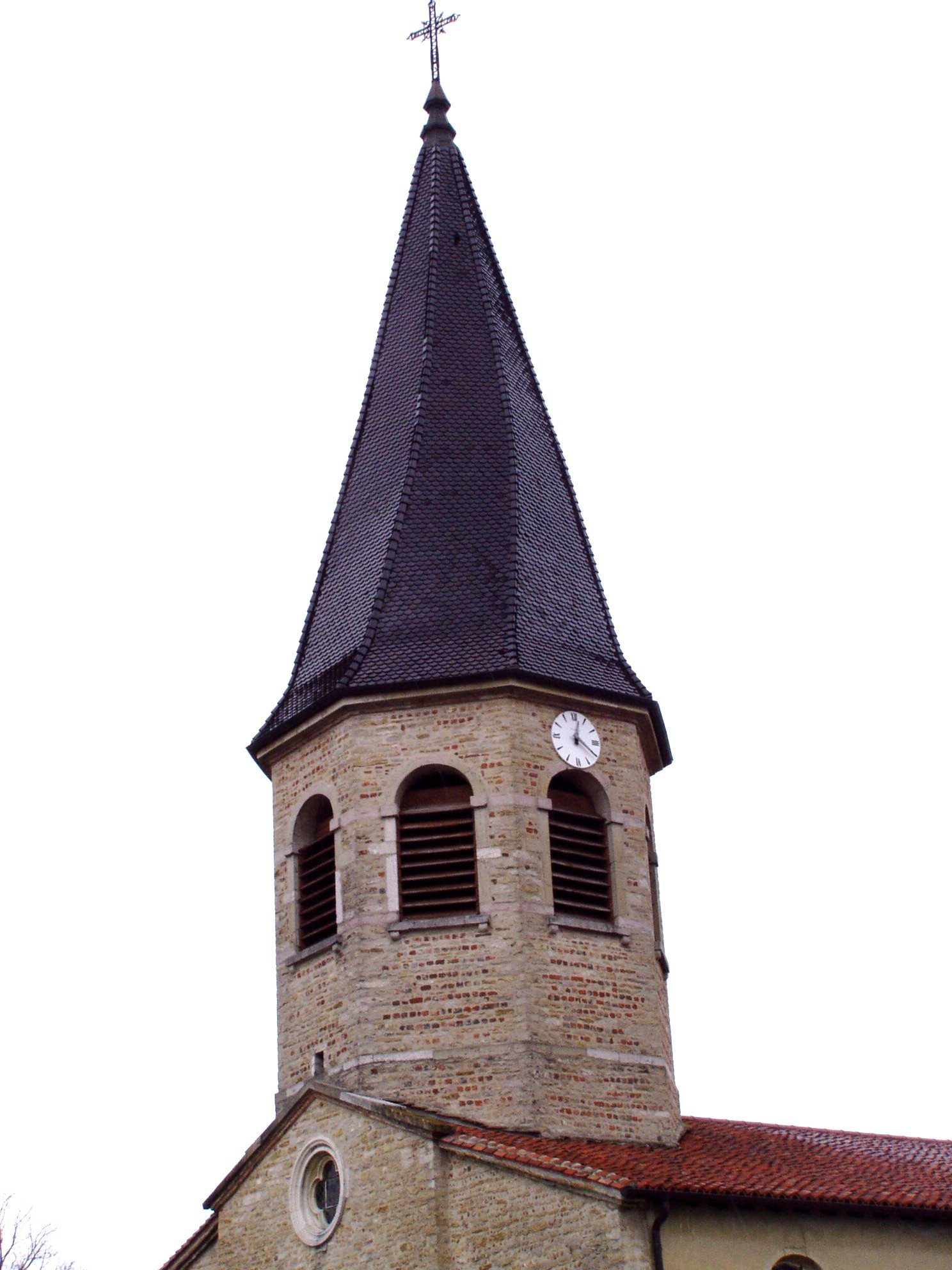 Clocher tors d'Attignat dans le département de l'Ain